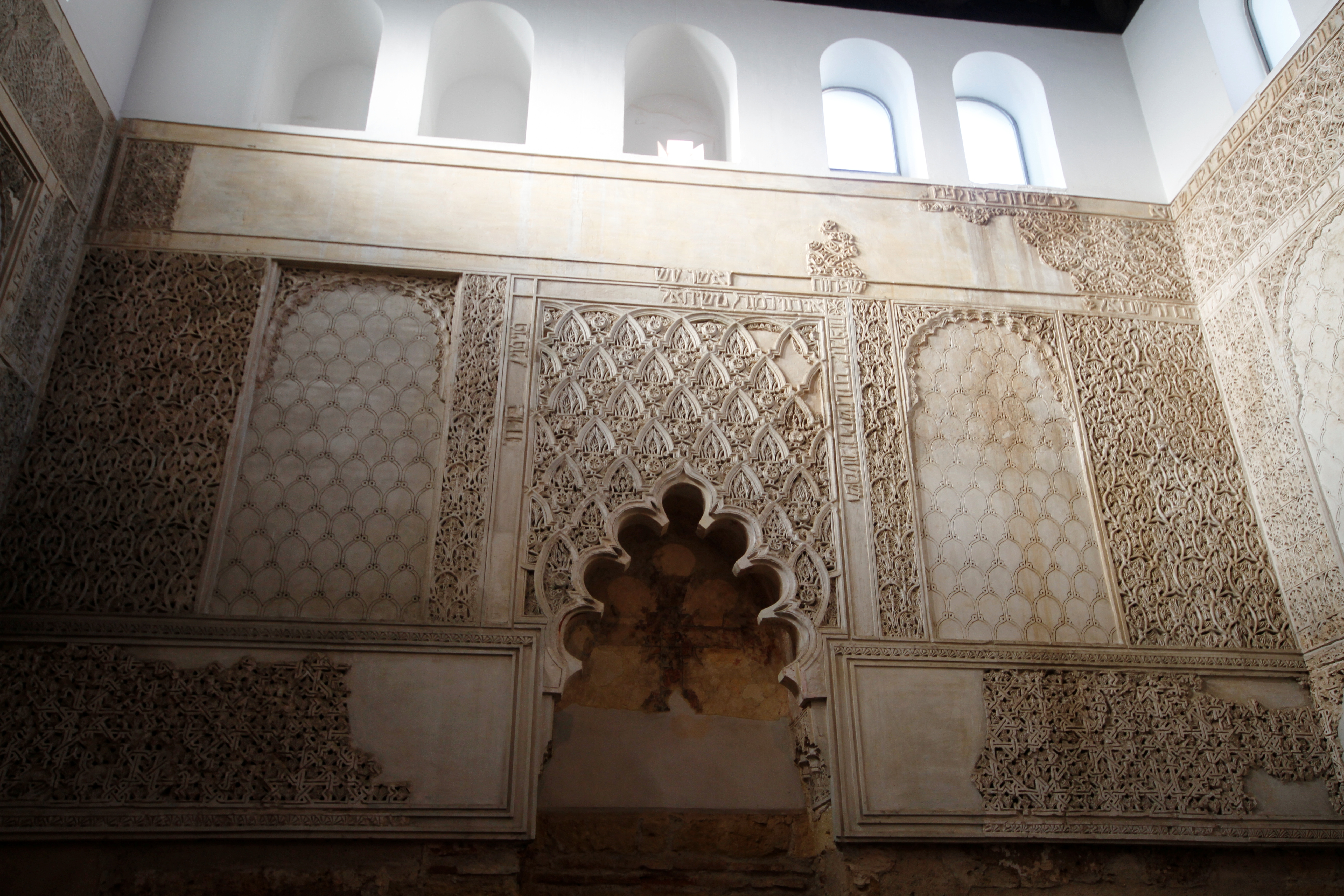 Sinagoga